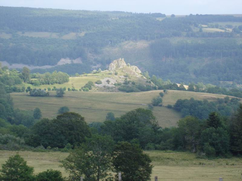 le site de Belvezet vu de la route du plateau qui relie Aubrac à Espalion Source lecybersurfeur